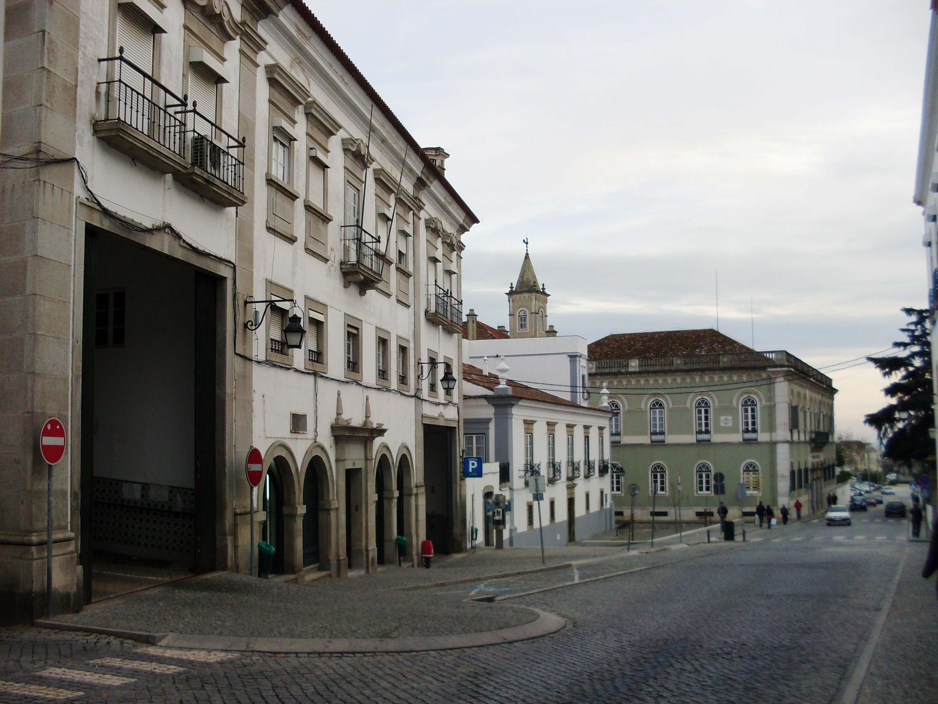 Rua da República, Évora, vista para o Tribunal da Relação / Edifício da Mundial Confiança / Palácio Barahona